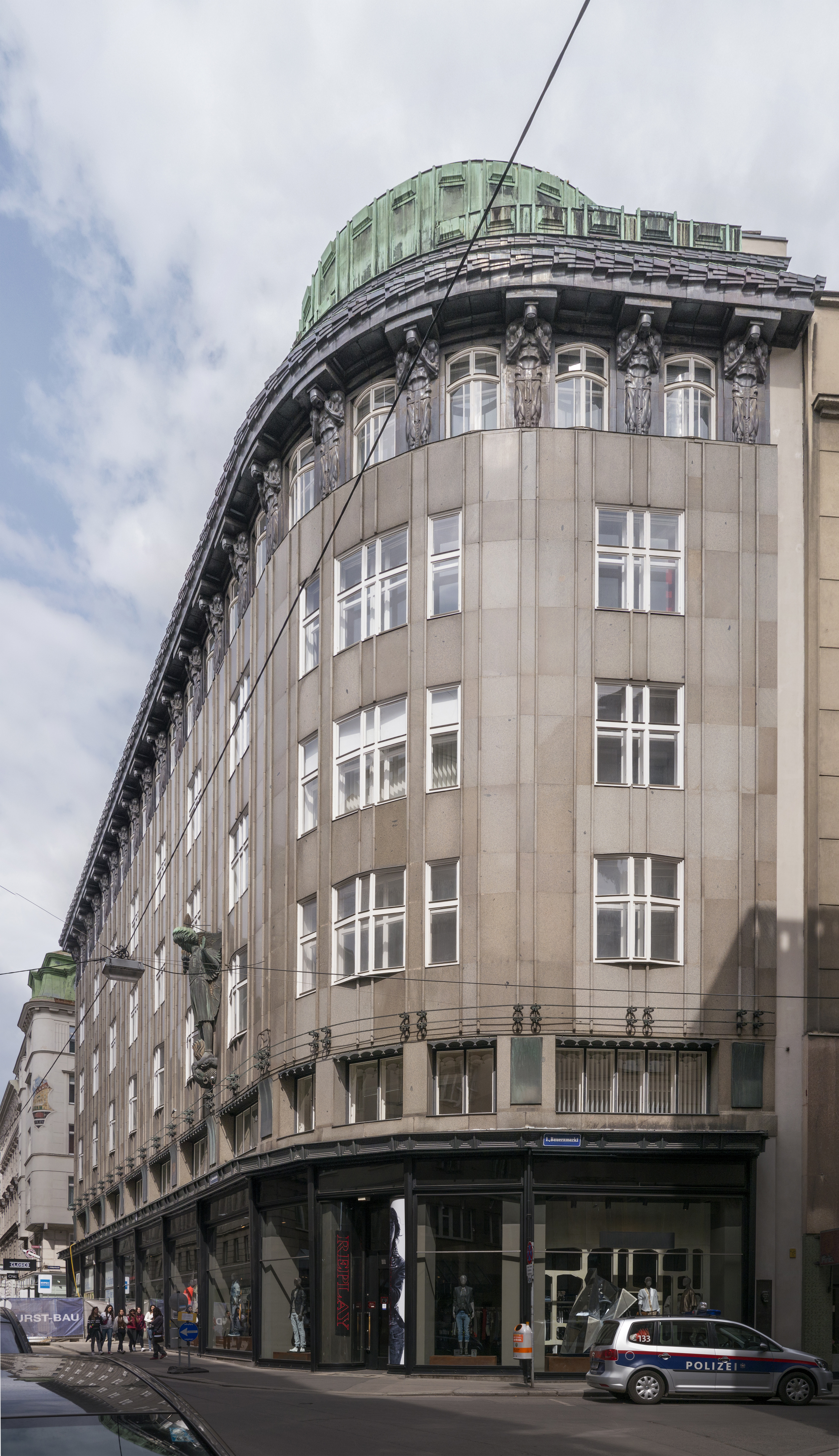 Zacherlhaus